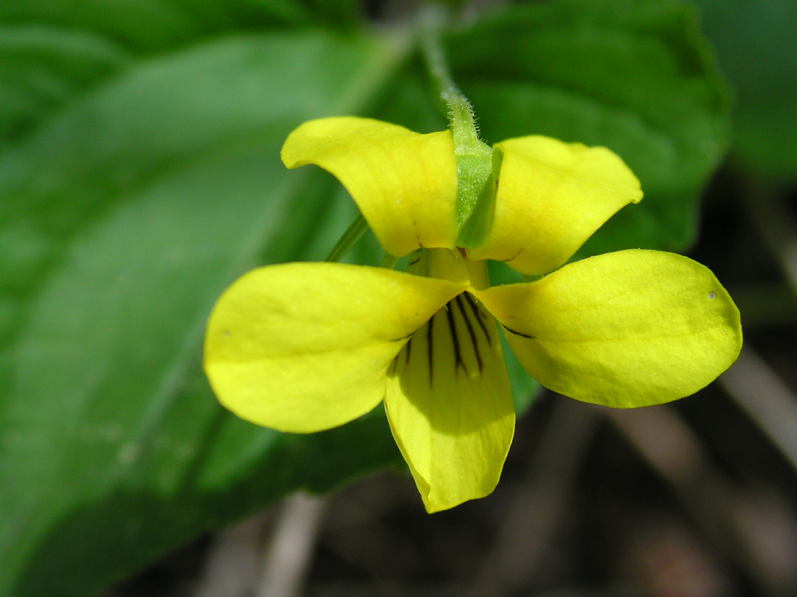 Viola_pubescens_1